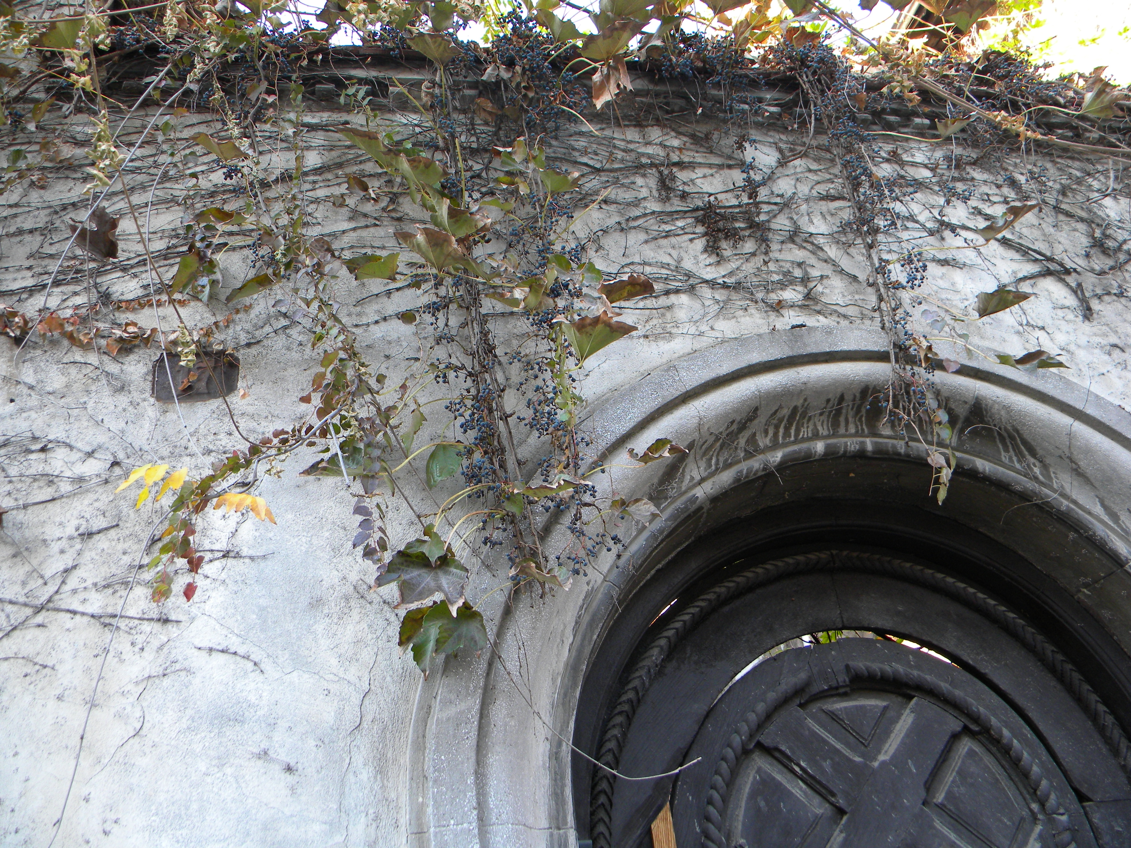 Bucuresti, Romania, Str. Alexandru Philippide nr. 17, sect. 2 (Cod B-II-m-B-19385) (2 prim)